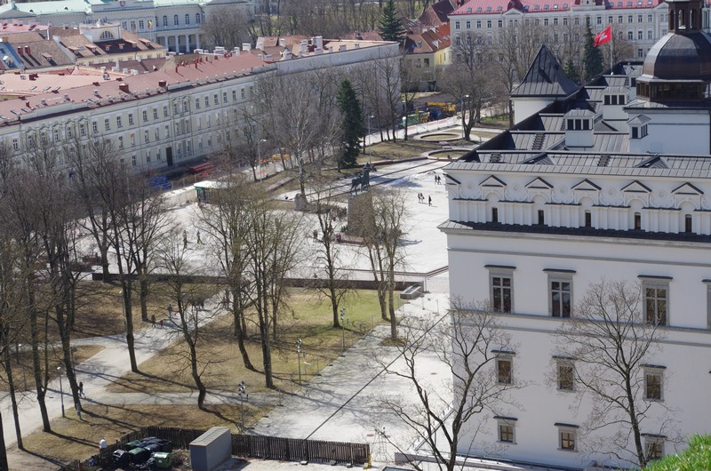 Šventaragio gatvė ir dalis Katedros aikštės